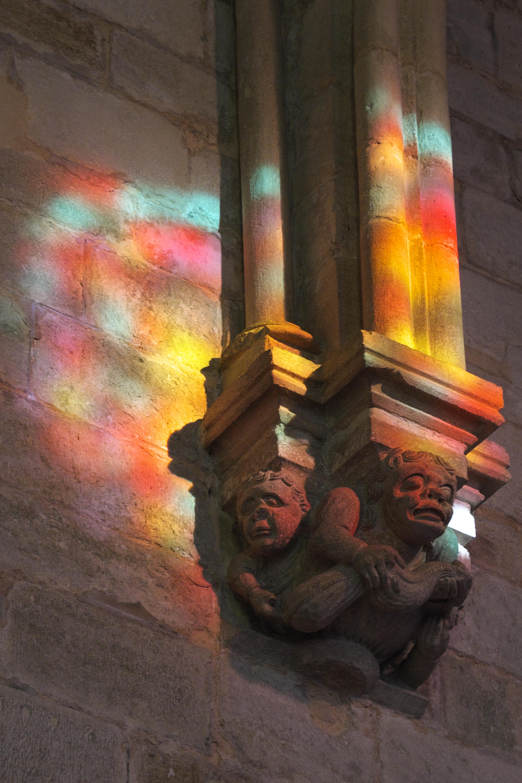 Katholische Pfarrkirche Notre-Dame in Vétheuil im Département Val-d’Oise in der Region Île-de-France (Frankreich), Konsole